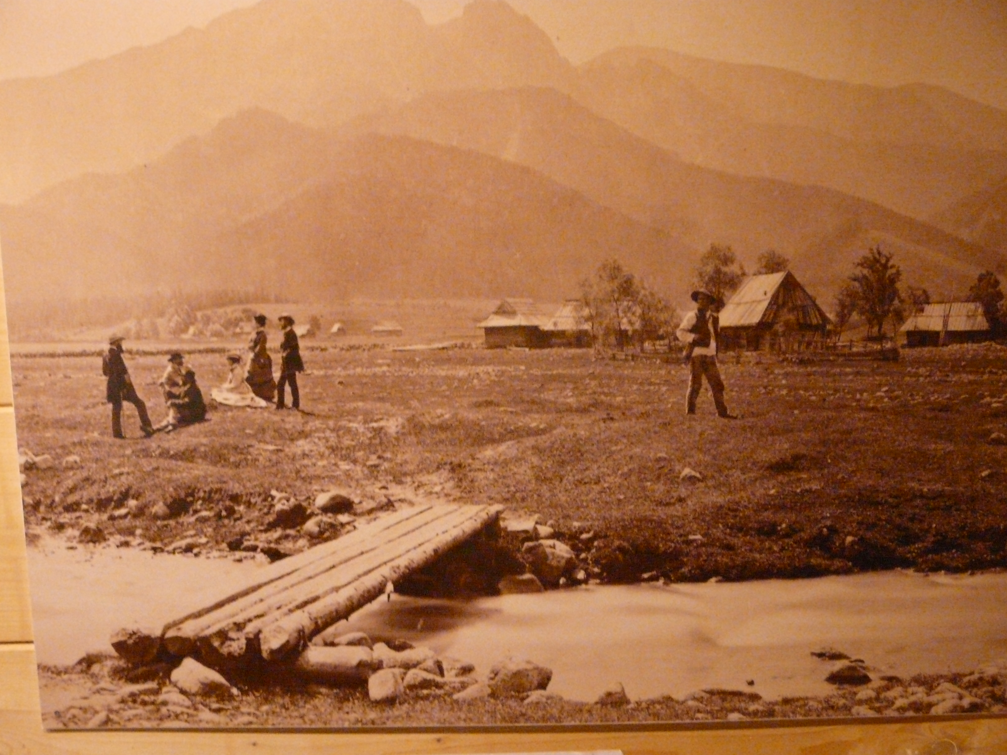 Zakopane. Zespół dworsko-parkowy w Kuźnicach, okolice i wnętrza. Awit Schubert, Giewont z Równi Krupowej, ok. 1876-1878.